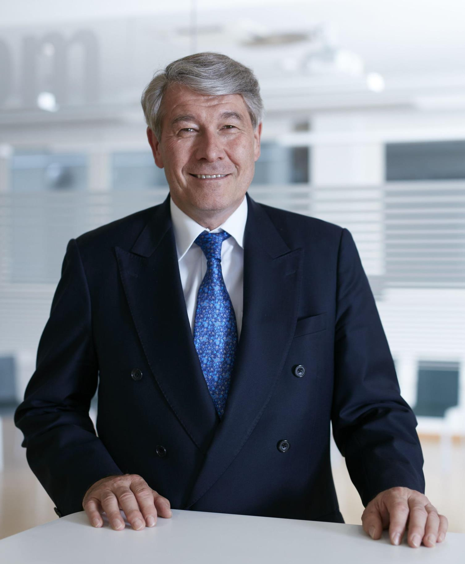 Wolfgang Büchele als Geschäftsführer der Exyte AG (vormals M+W Group)